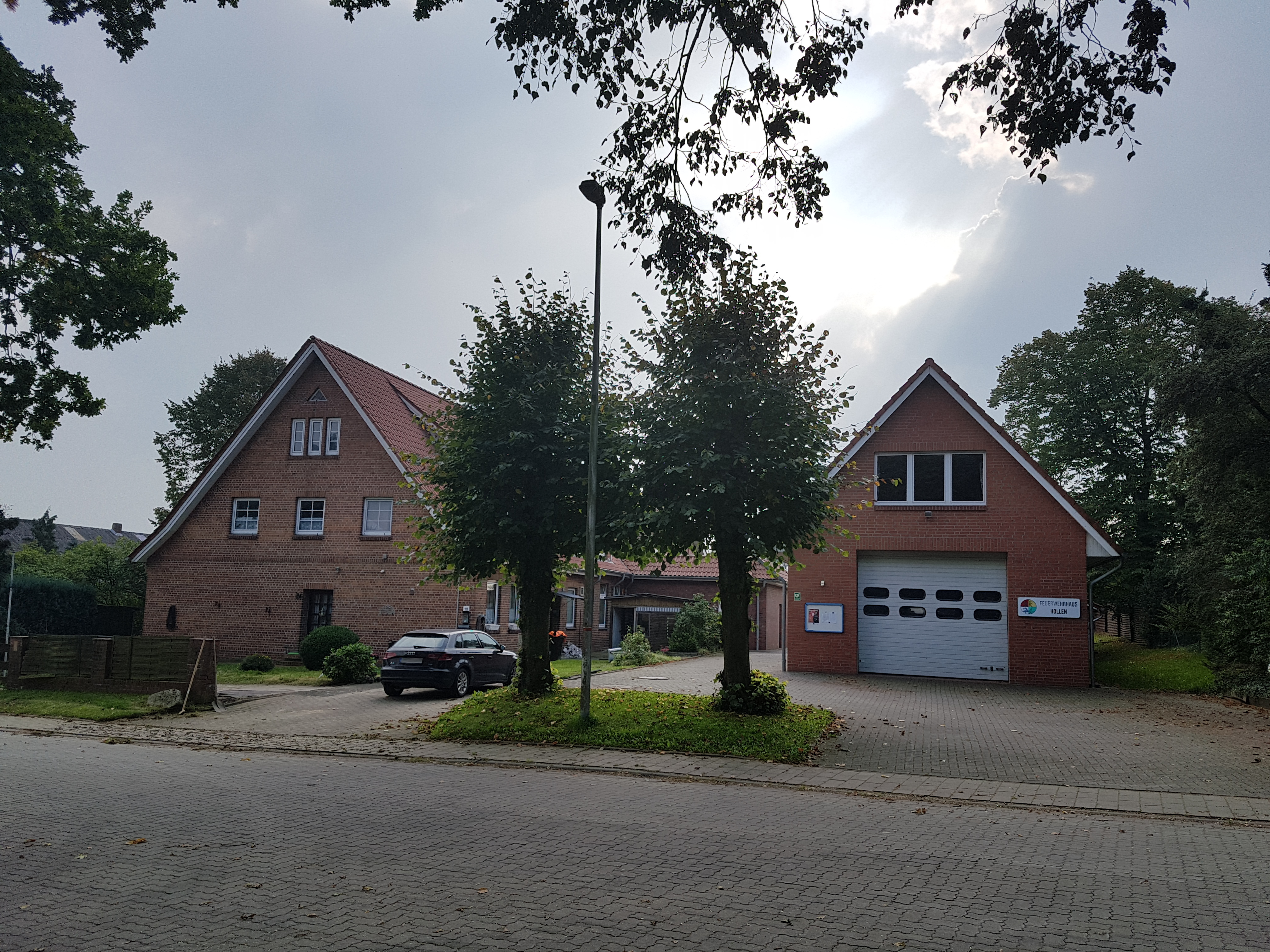 Dat Sprüttenhuus un de ole School in Hollen